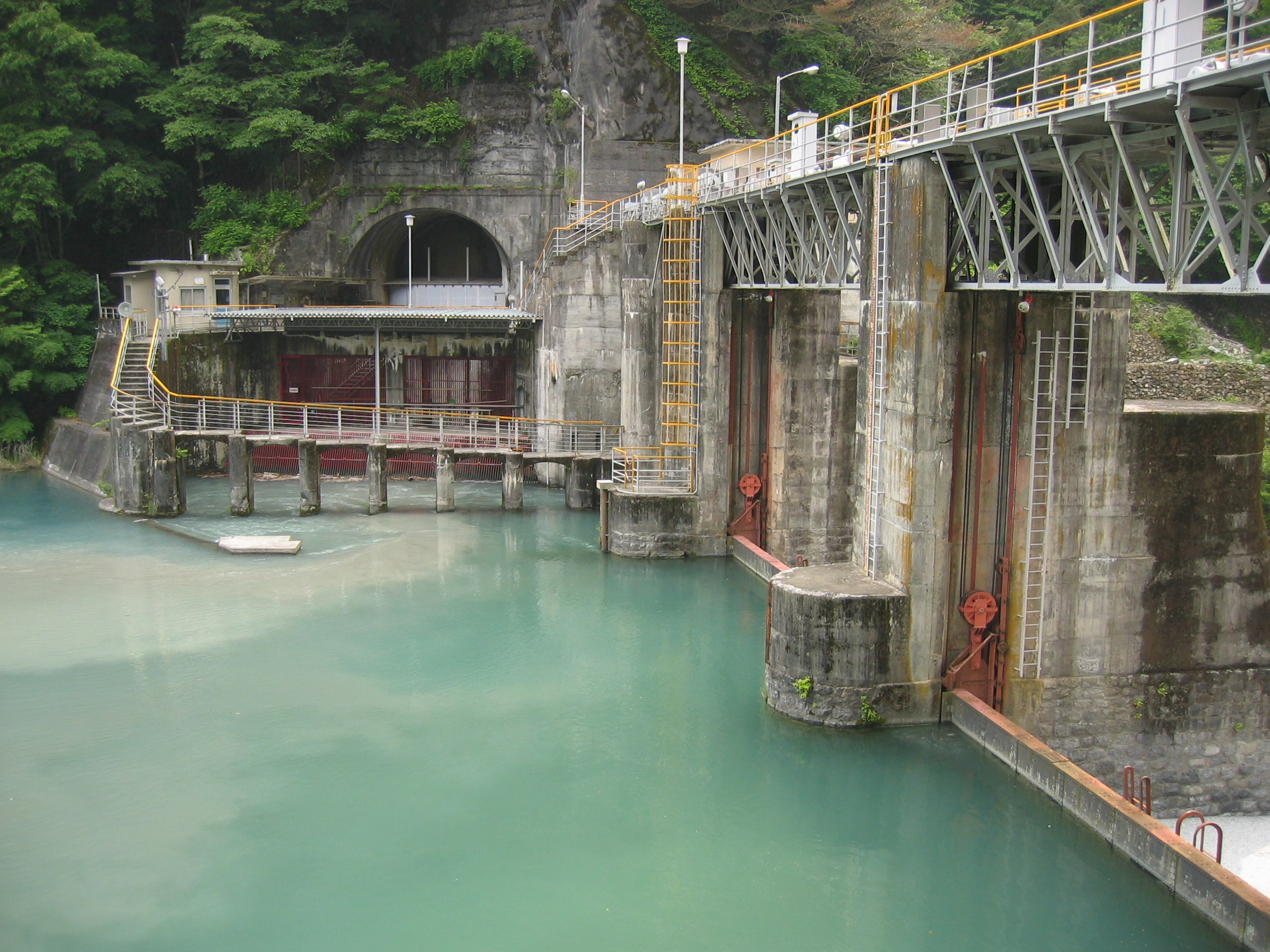 Ikuta dam (生田ダム) is a dam in Japan.